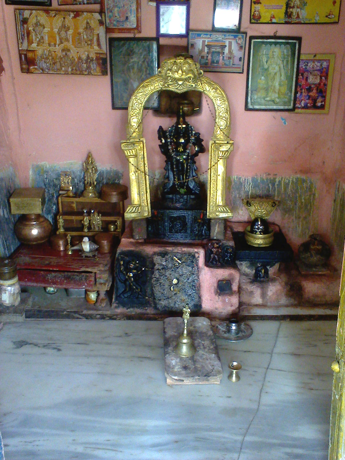 Sri Parthasarathi Swamy